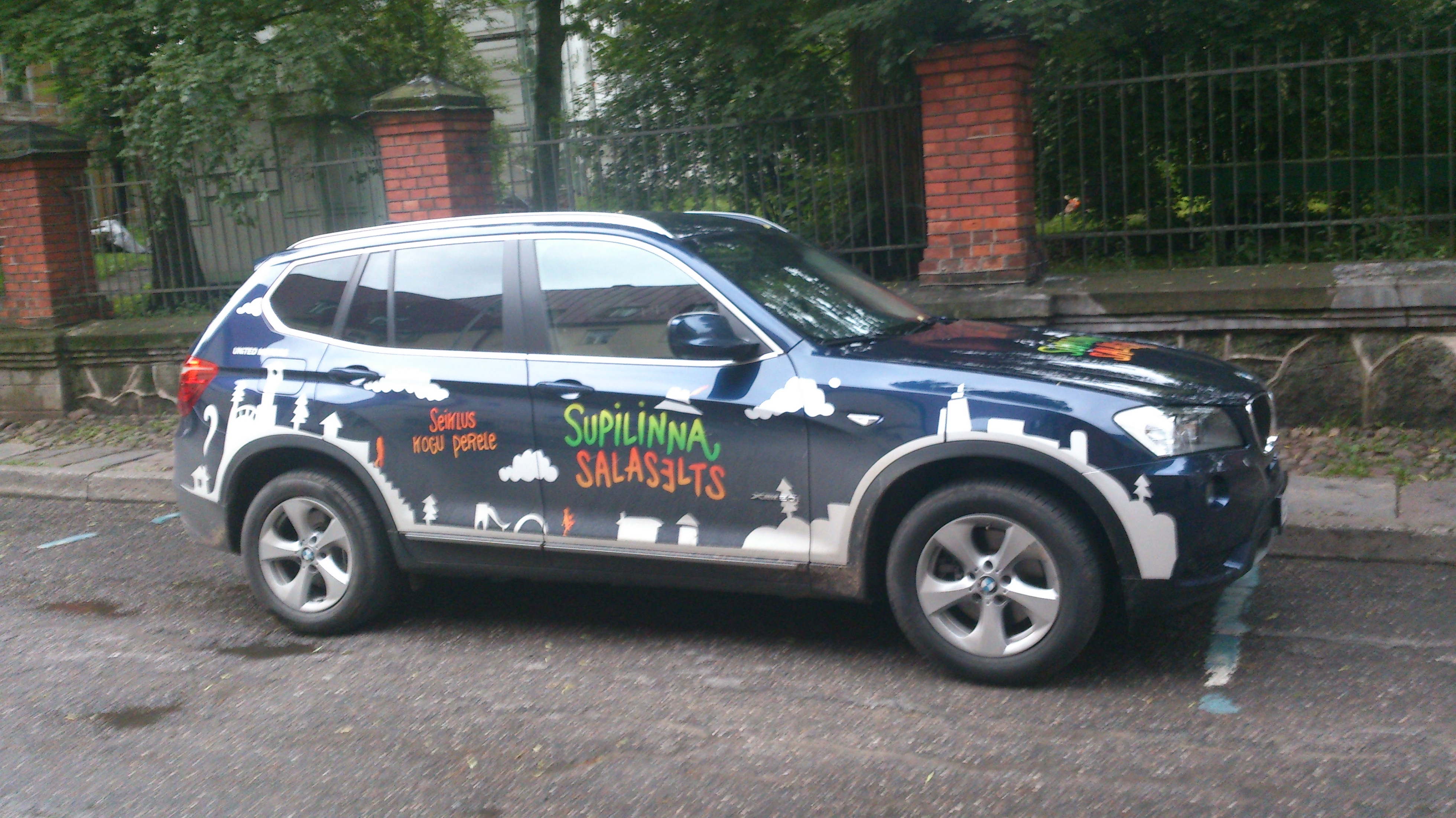 'Supilinna salaseltsi' reklaamiga auto Tartus Magasini tänaval, 29. juuni 2014